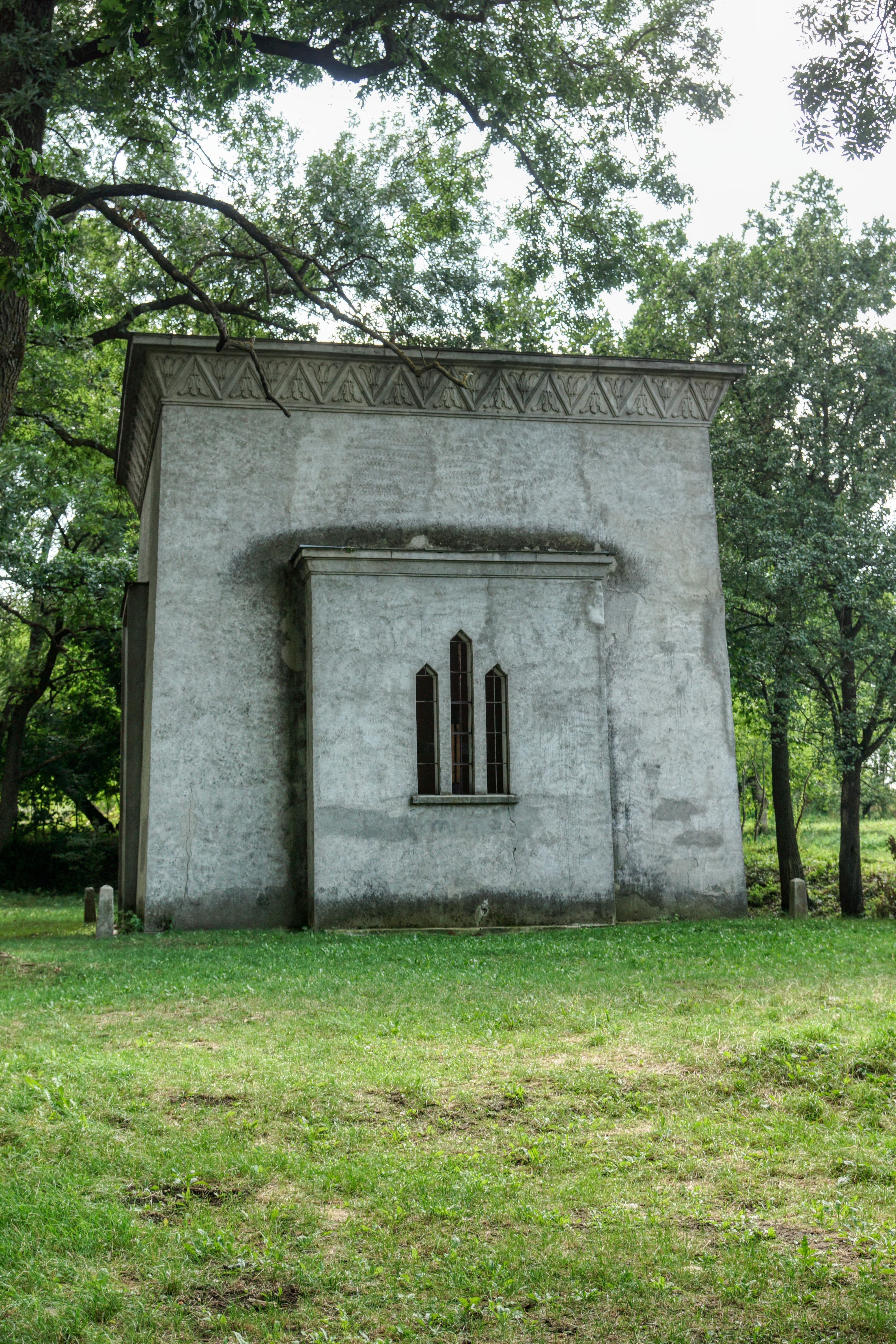 Mausoleum exterior